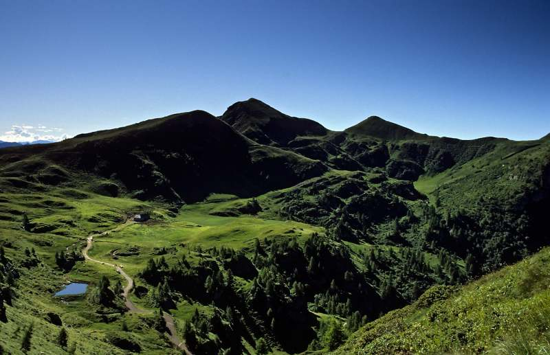 Costone delle Cornelle am Südrand der Adamellogruppe, Italien